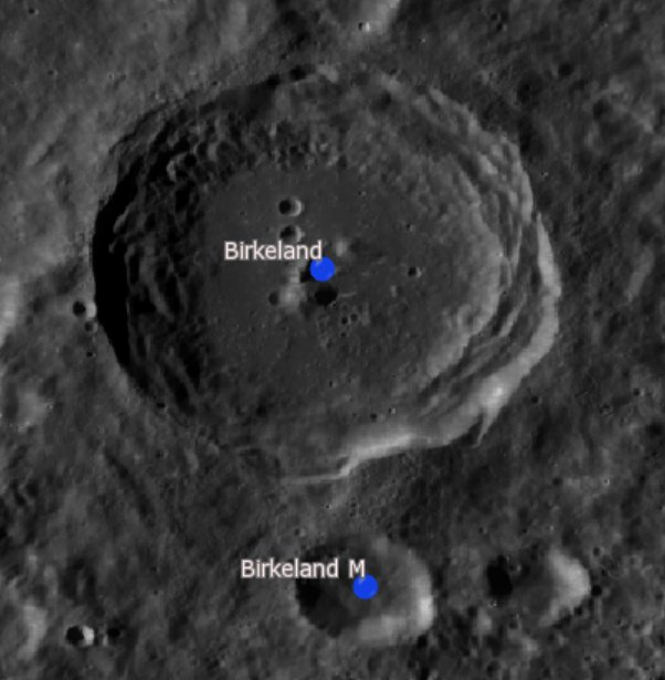 Cráter lunar Birkeland. Cráteres satélite. (Imagen LRO)